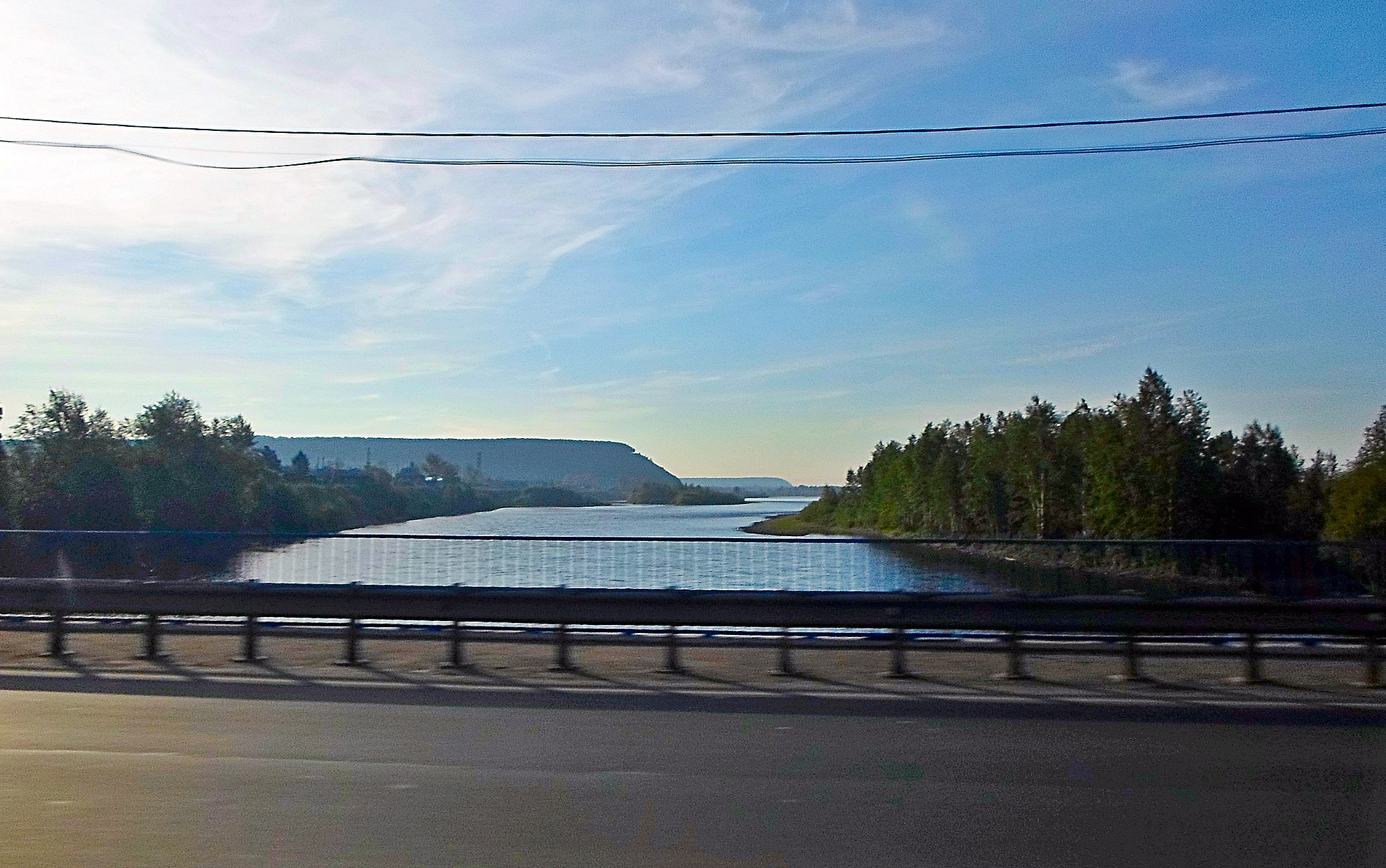 Нижнеудинск. Вид на юго-восток на реку Уду с моста федеральной автомагистрали Р255 Сибирь.